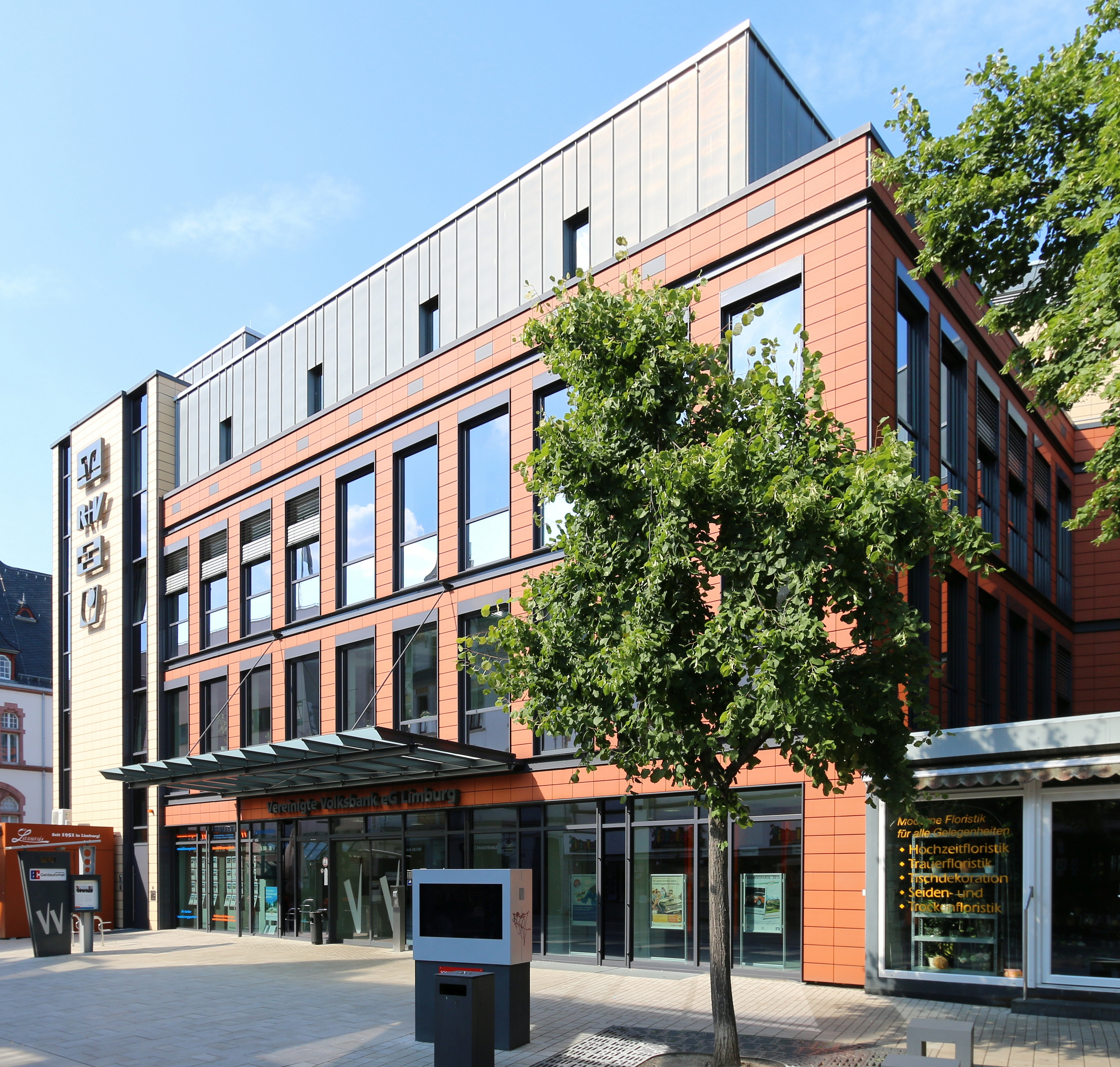 Limburg an der Lahn: Hauptsitz der Limburger Volksbank